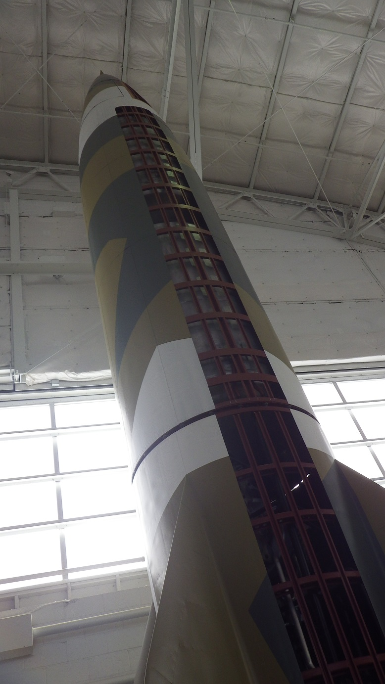 V-2 Rocket Flying Heritage Collection